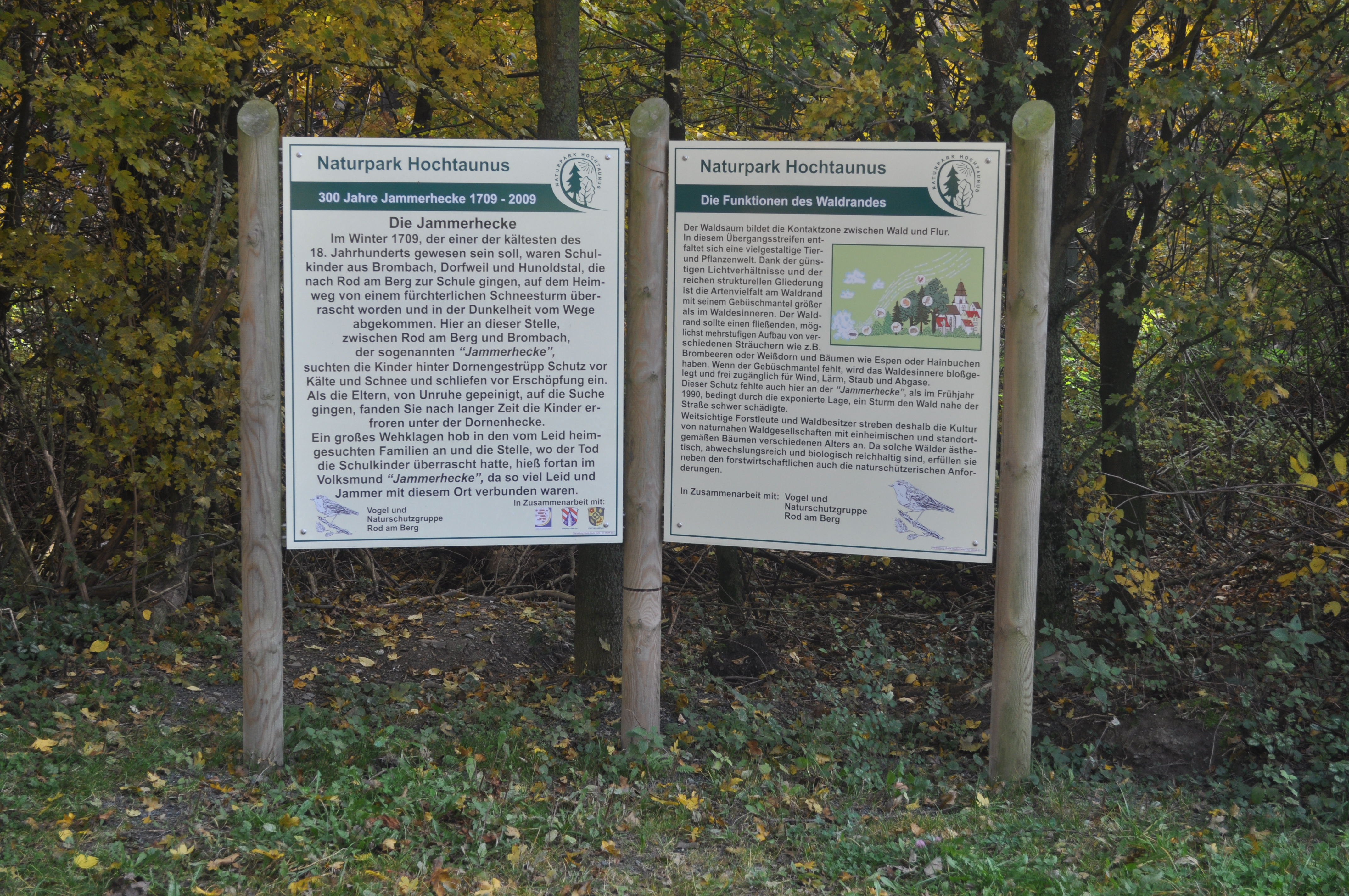 Jammerhecke